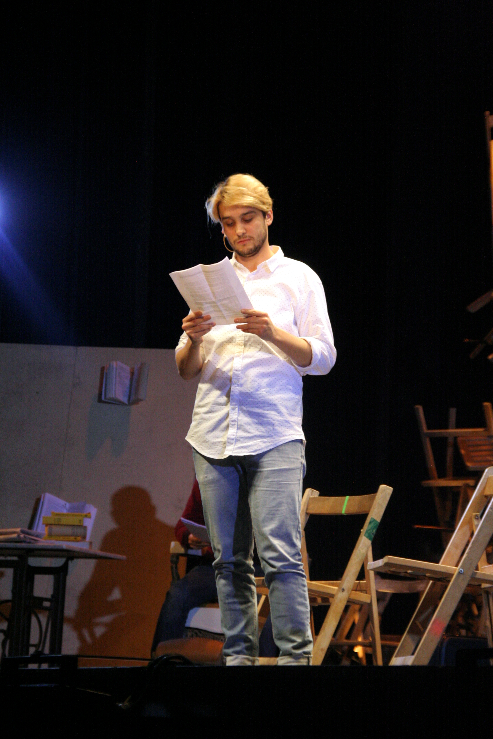 Al capdavall som bàrbars. Homenatge a Joan Oliver realitzat el 30 de novembre de 2016 al Teatre de la Faràndula de Sabadell.